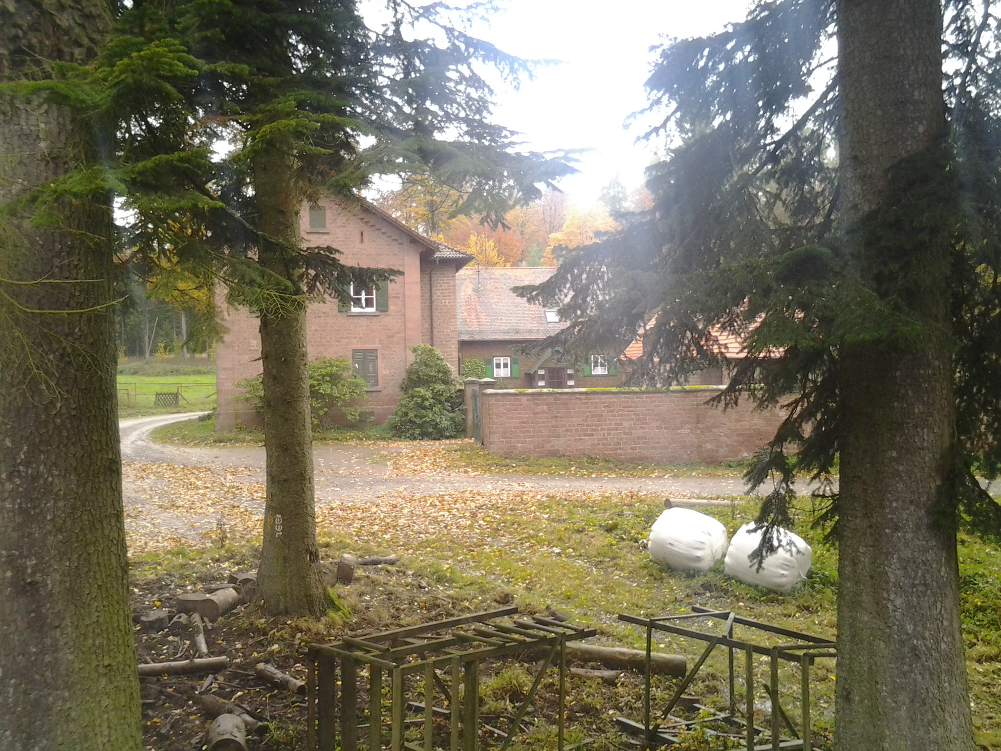 Das Jagdschloss Max-Wilhelms-Höhe in Waldbrunn